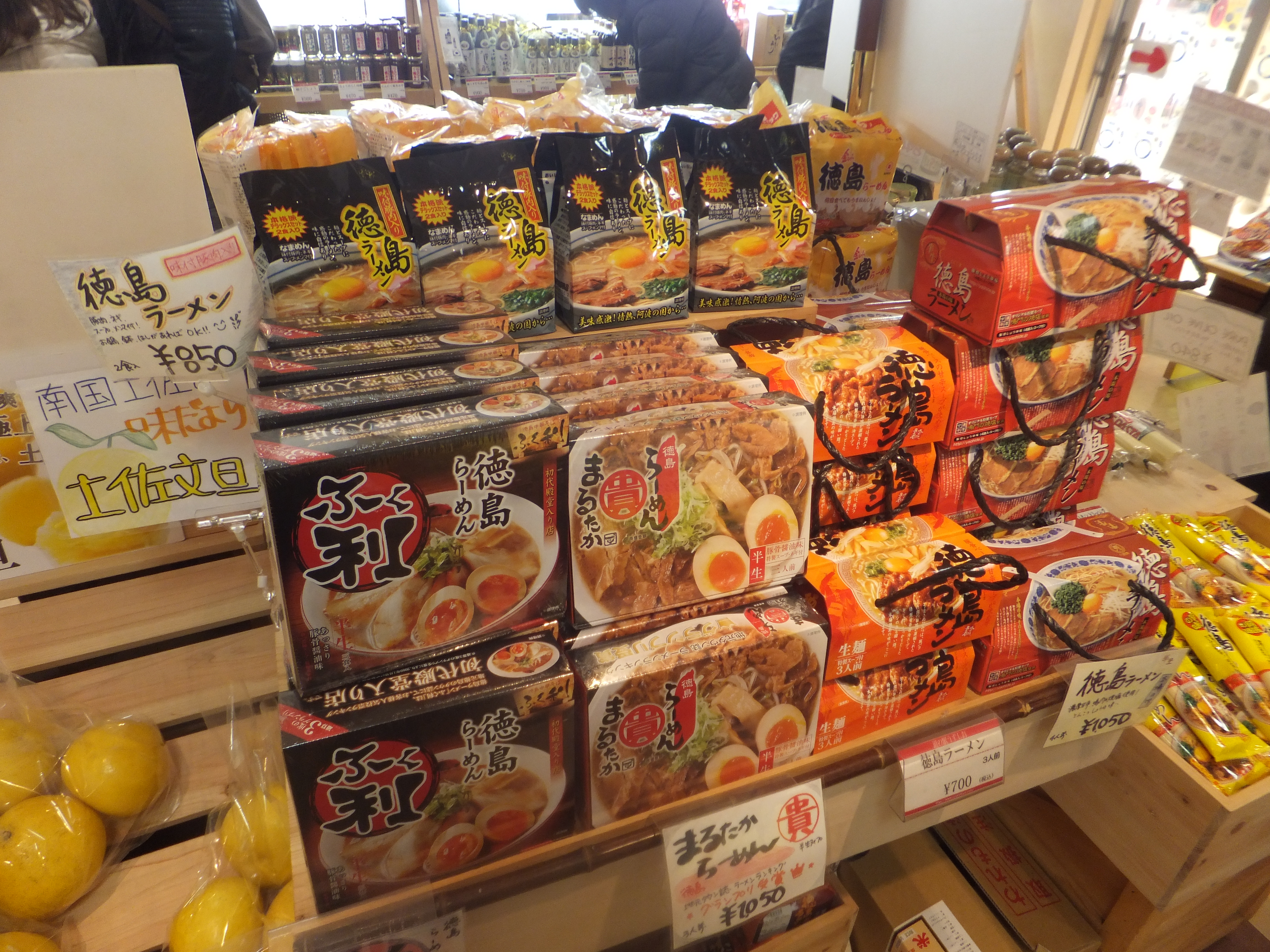 徳島ラーメンインスタント